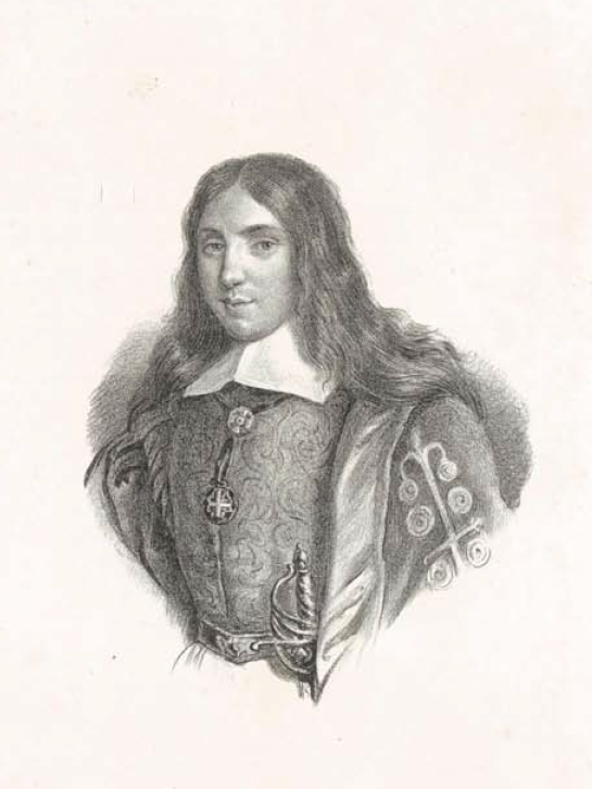 Dal Dizionario biografico degli uomini illustri di Sardegna di Pasquale Tola, 1837